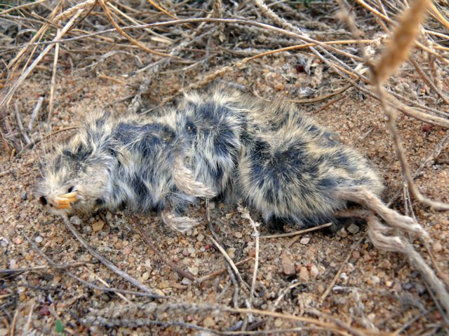 Cadáver de topillo (Microtus arvalis asturianus) en estado de semidescomposición